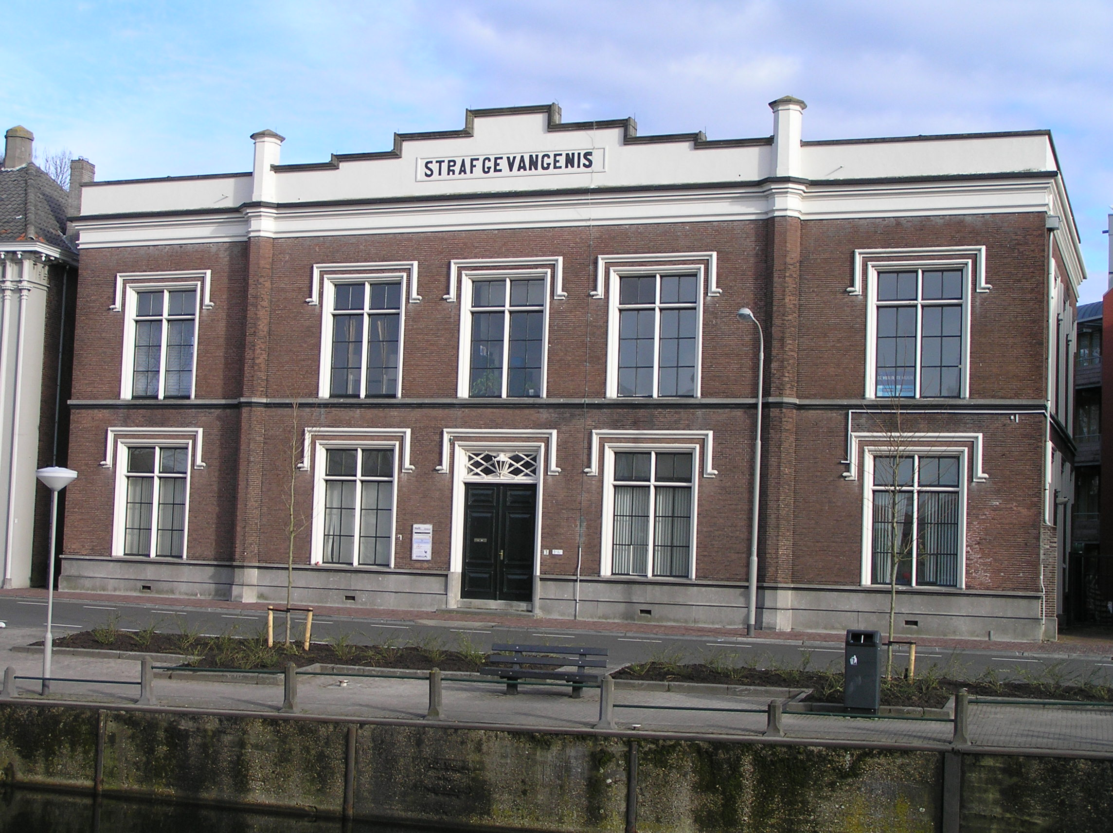 Voormalige strafgevangenis, Albert Joachimikade 3, Goes. Rijksmonument